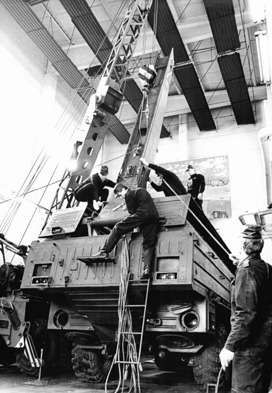 ADN-ZB Pätzold-15.3.90 Bez. Schwerin: Mit der Vernichtung eines weiteren Transportladefahrzeuges und eines Startaggregates wurde die Verschrottung des Raketenkomplexes OKA (SS 23) im NVA-Verband "Bruno Leuschner" in Demen planmäßig fortgesetzt.